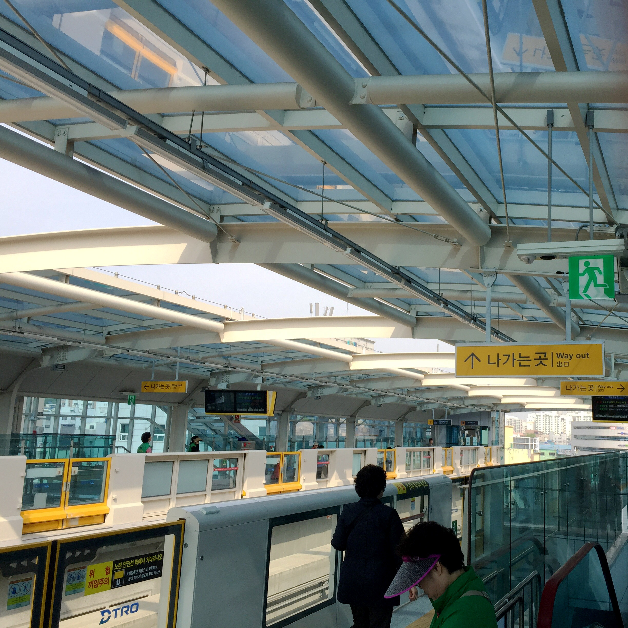 원대역 승강장